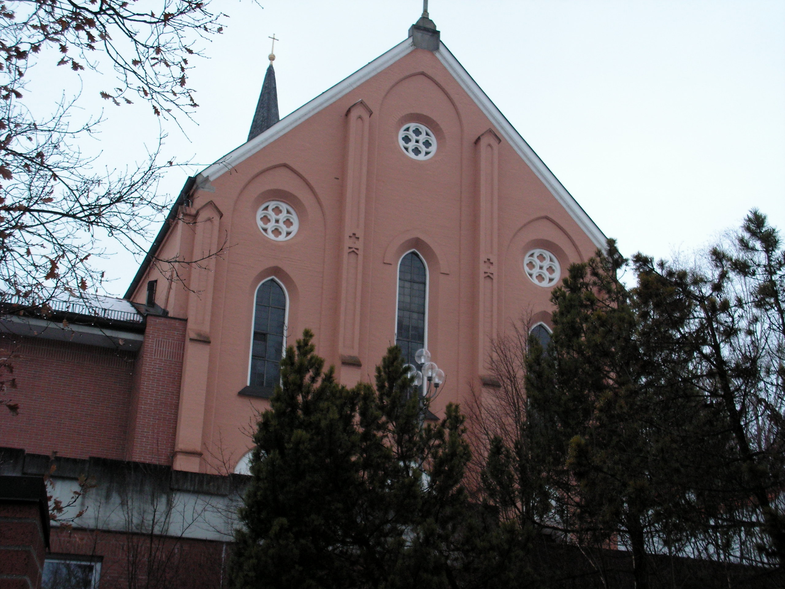 neogorische Hauptfassade der Franziskanerkirche Dingolfing (1853-1867)